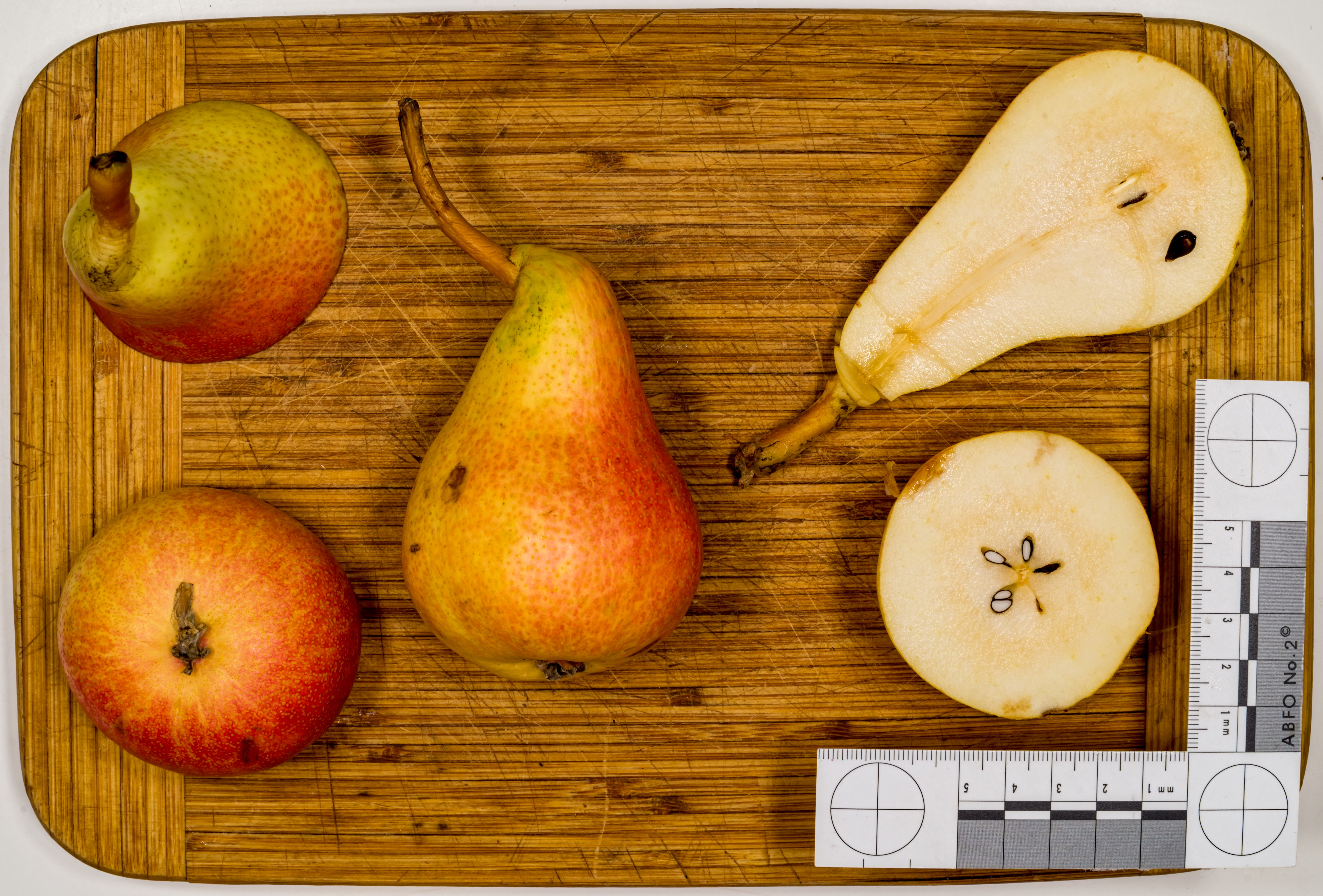 Birnensorte: Carmen Eine Kreuzung aus Dr. Guyot- und Bella-di-Giugno-Birnen (1980) vom Instituts für experimentellen Obstbau in Forlì